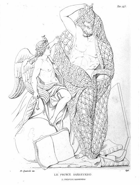 Incisione rappresentante la scultura "Il disinganno" di Francesco Queirolo.